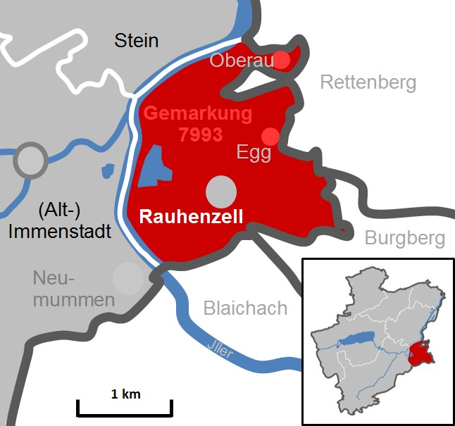 Immenstadt Gemarkung 7993 Rauhenzell - (erstellt mit MS-Excel)